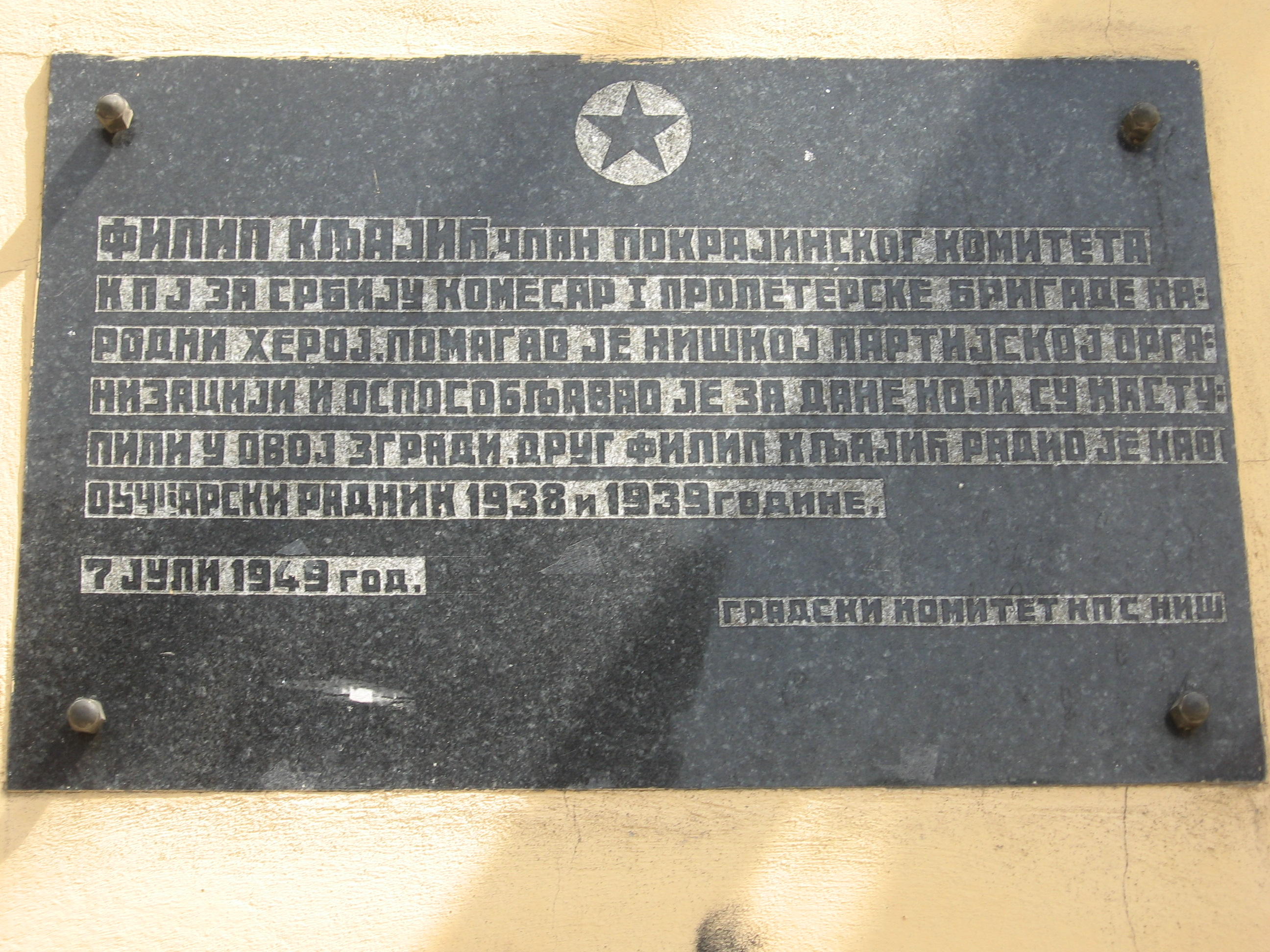 Spomen ploča narodnom heroju Filipu Kljajiću u Nišu.